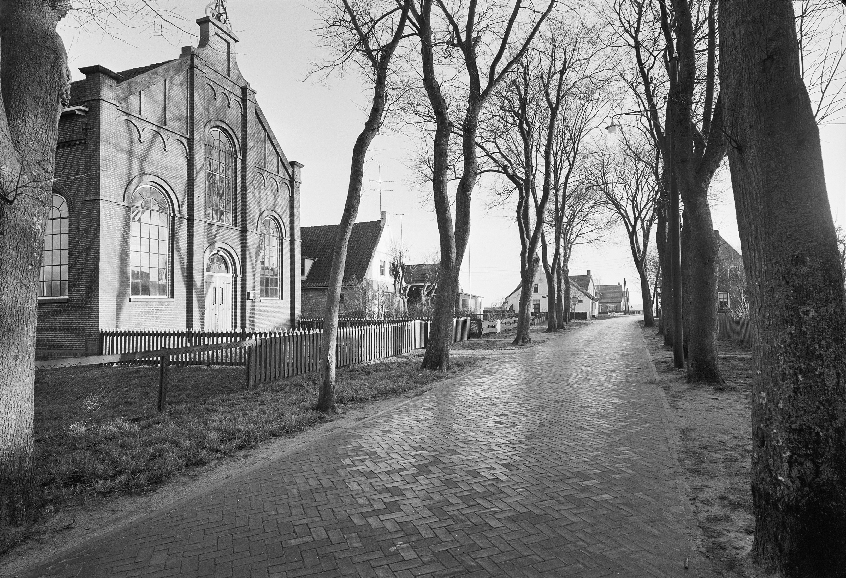 Overzichten: Herenweg 2-4